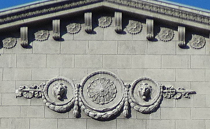 Лев'ячі маскарони. Будинок на Хрещатику, Київ, вул. Хрещатик